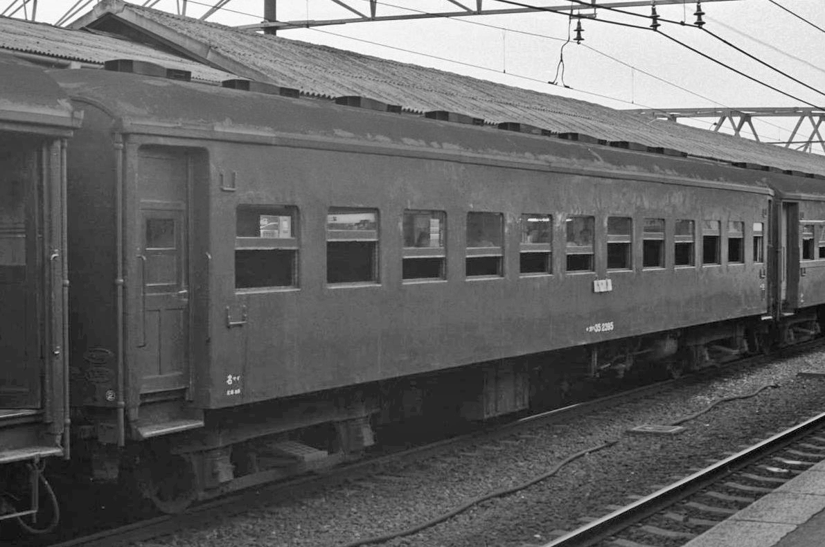 JNR type Oha 35 type oha 35 2395, in Maibara, Shiga Prefecture（オハ35 2395 米原駅）ノーシル・ノーヘッダーのオハ35